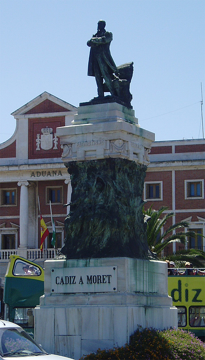 Estatua de Segismundo Moret y Prendergast en Cádiz, España. Obra de Agustín Querol.